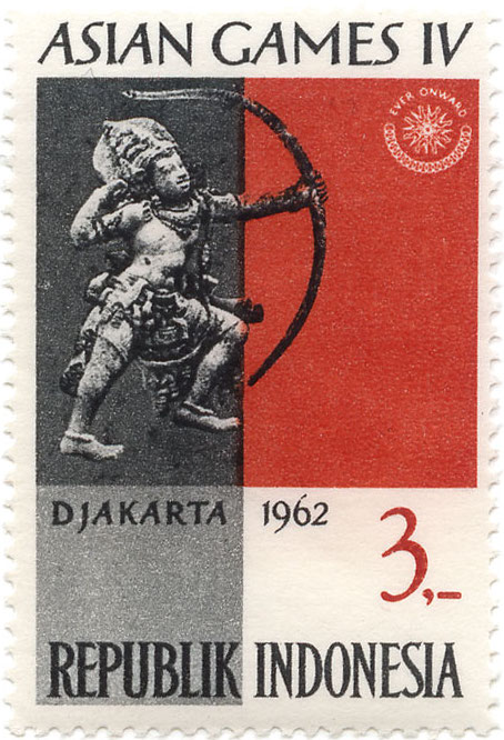 Asian Games IV